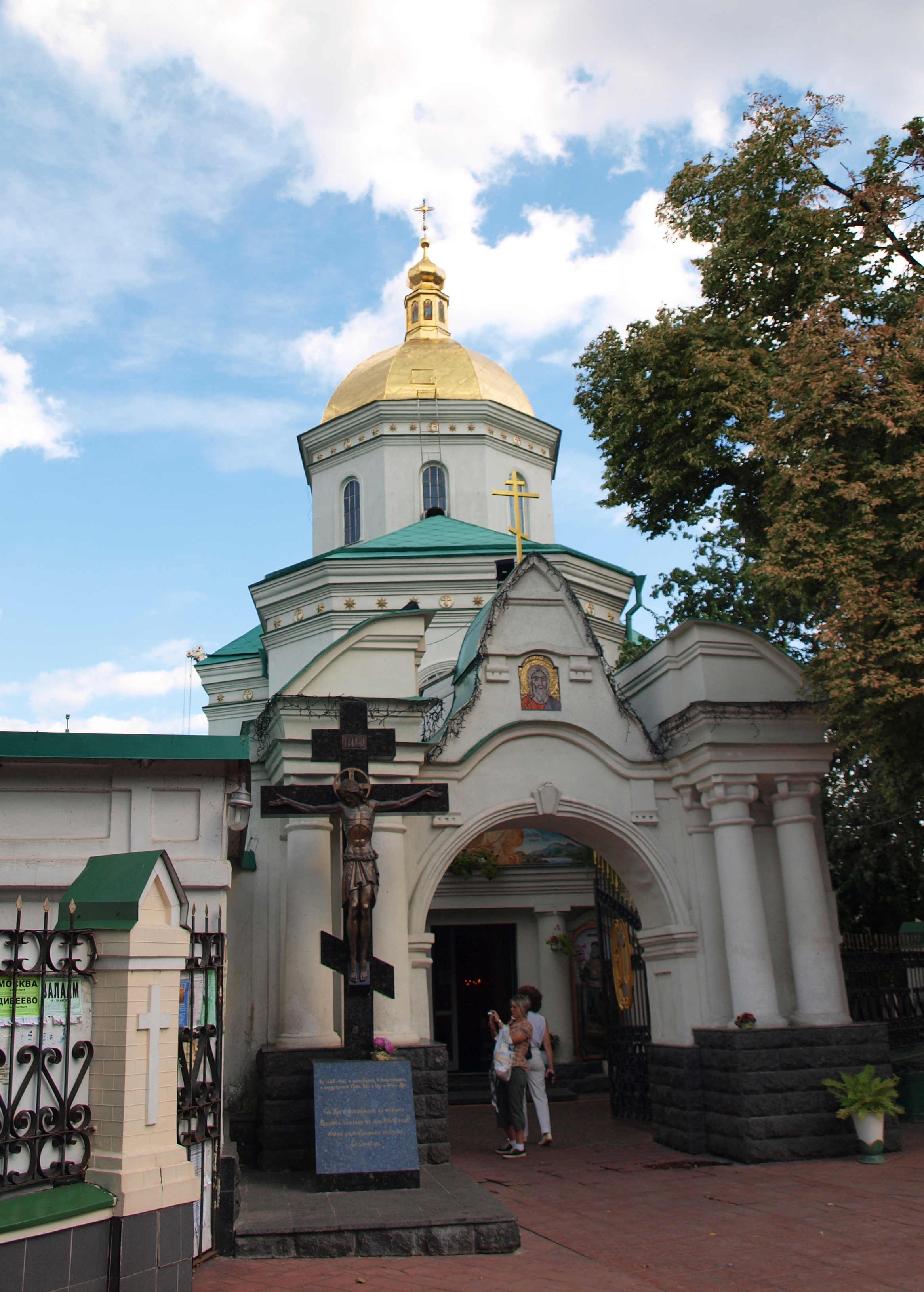 Ильинская церковь в Киеве